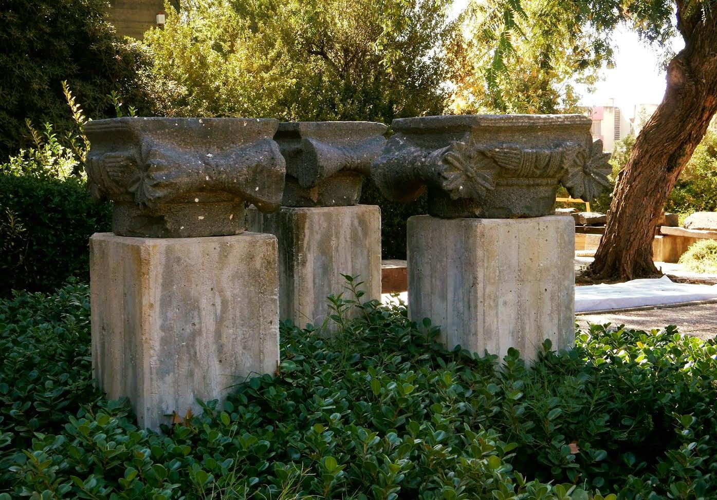 כותרות בסגנון יוני מכנסיה בתקופה הביזאנטית - חיספין. מוצג במוזאון עתיקות גולן בקצרין